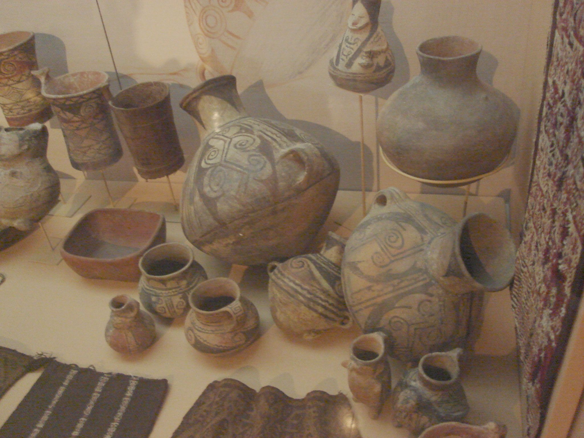 Foto tirada por mim, em Arica.